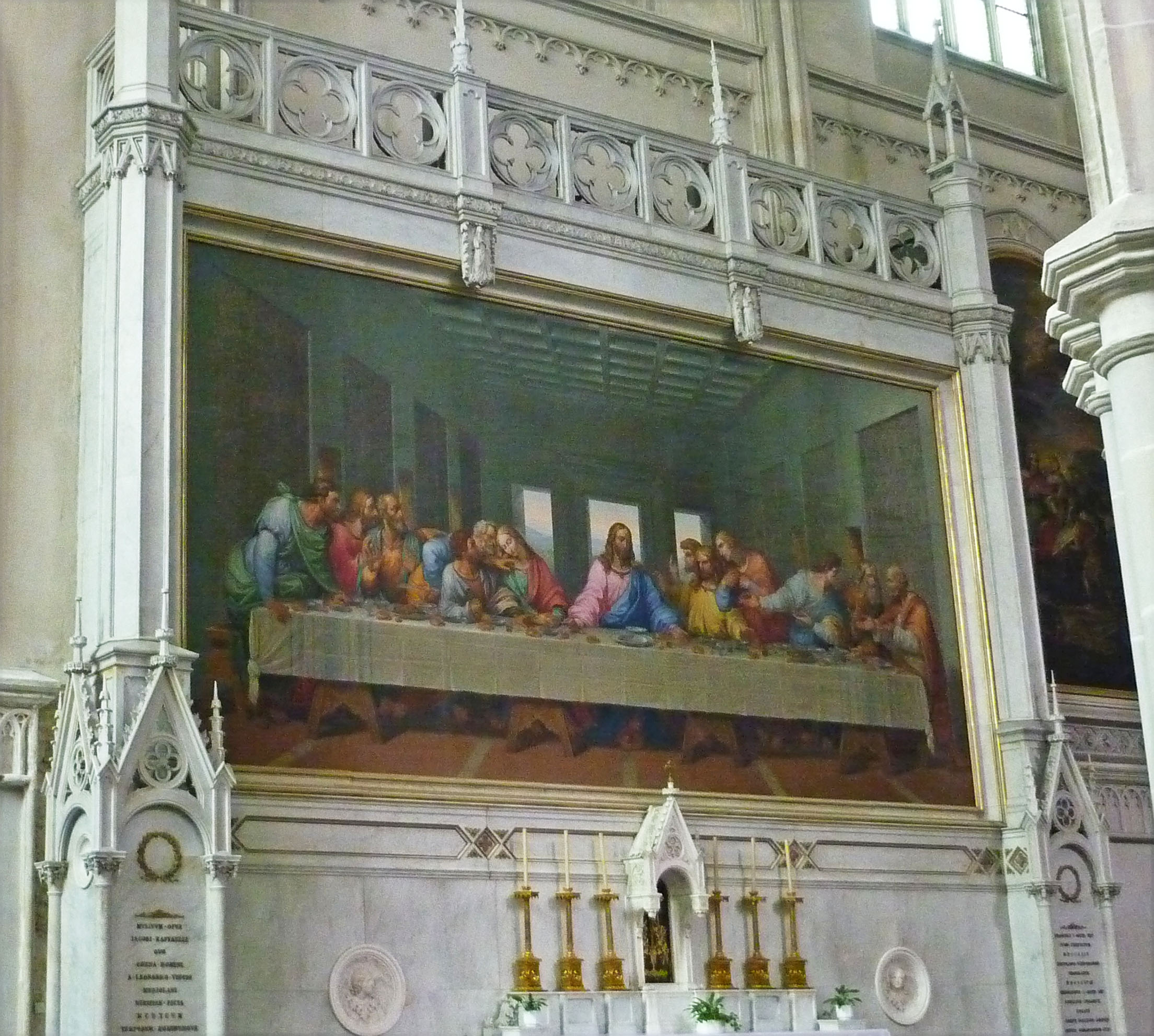 Minoritenkirche Wien, Minoritenplatz